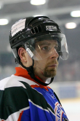 Mike Losch im Trikot des EHV Schönheide